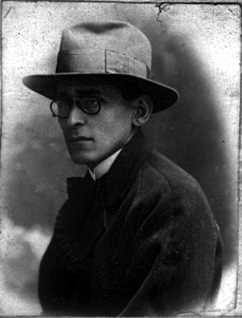 Carnet de reconocimieto "Conferenza Intenazionale Economica". Genova 1922. (Foto de José Carlos Mariátegui como redactor de "El Tiempo").